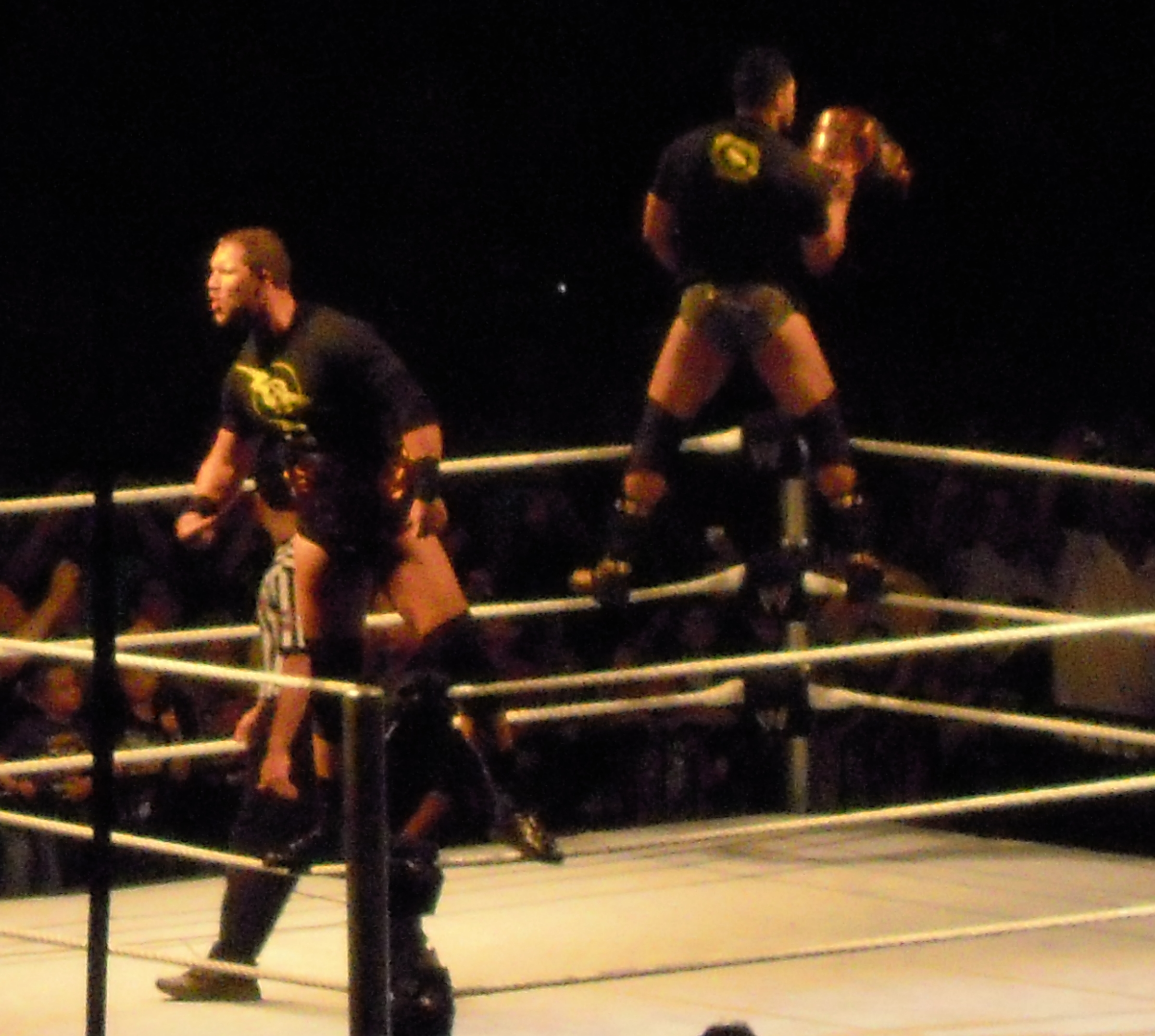 hennig y otunga campeones